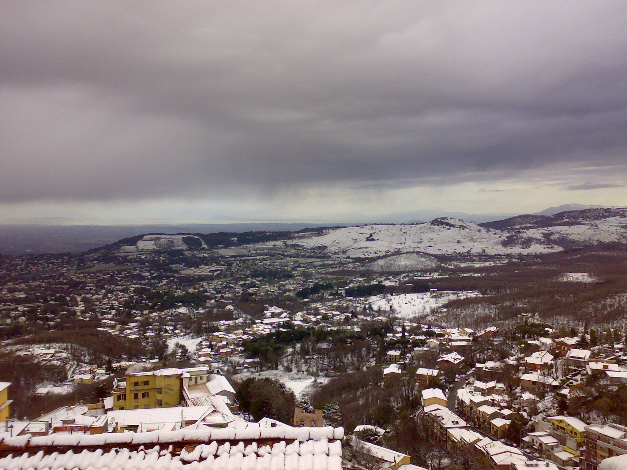 Panorama sulle colline dei Castelli Romani dopo la nevicata del 25/03/2008